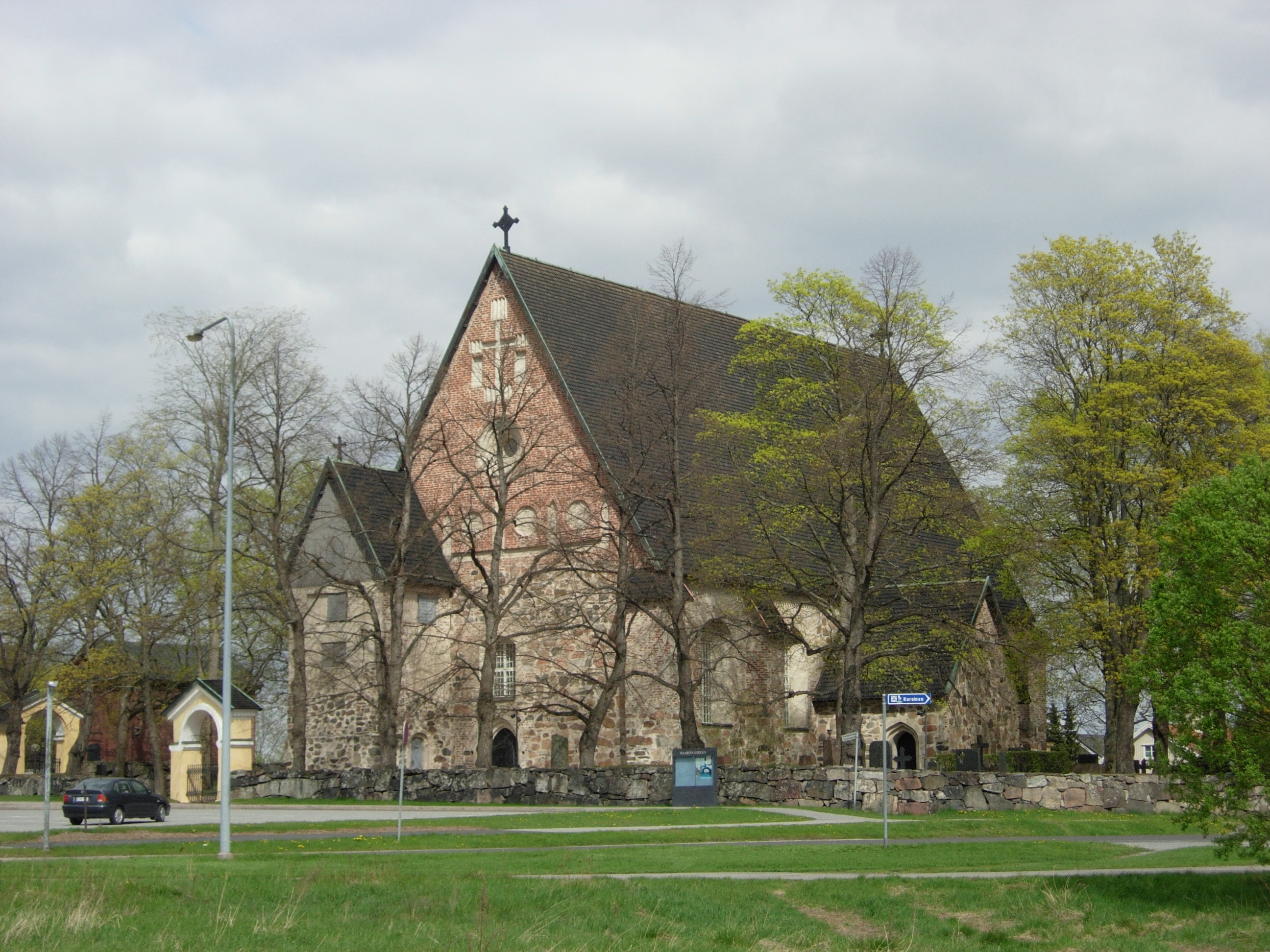 Maarian kirkko